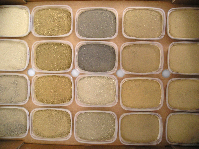 Verschiedene Bodenarten aus Baden-Württemberg Quelle: Dr. Eugen Lehle